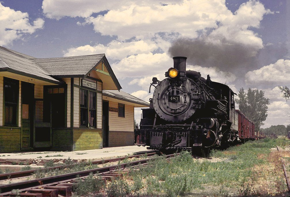 D&RGW 483 at Aztec NM June 23 1967xRP